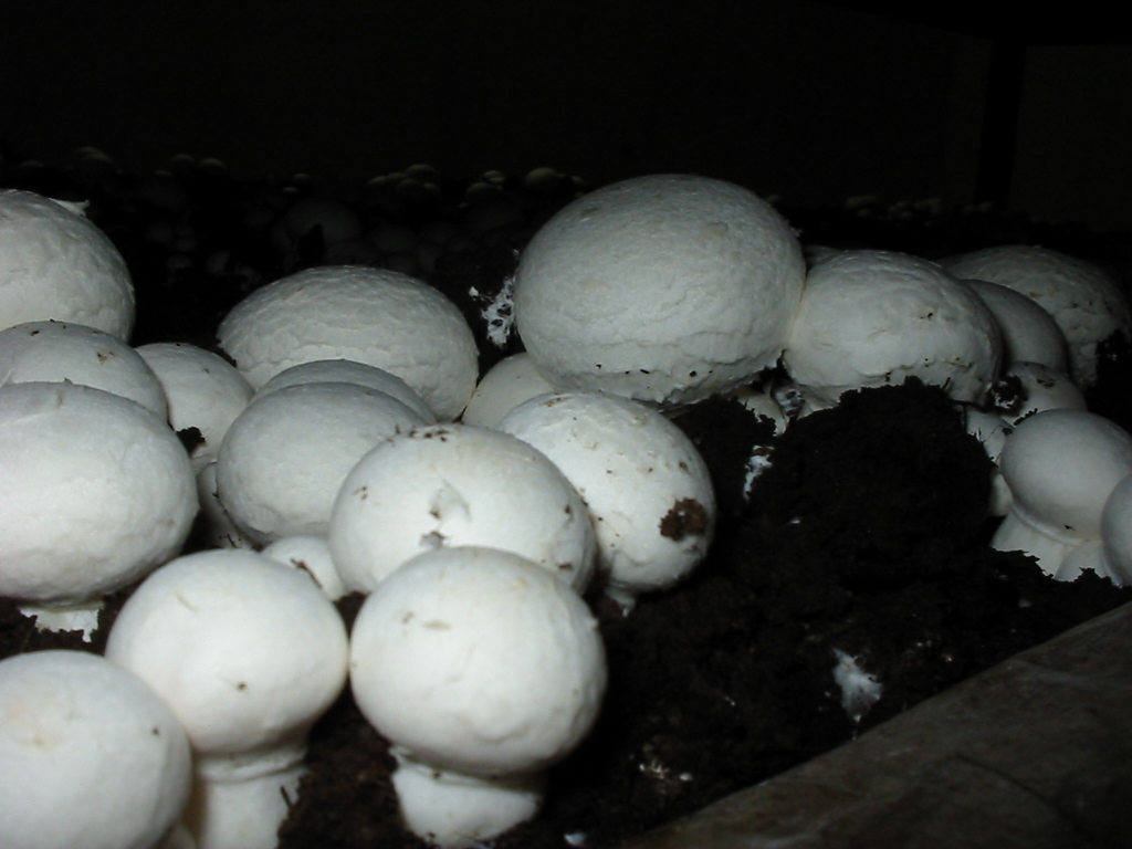 Шампиньоны. Первая "волна". 6-12 часов до сбора. Agaricus bisporus